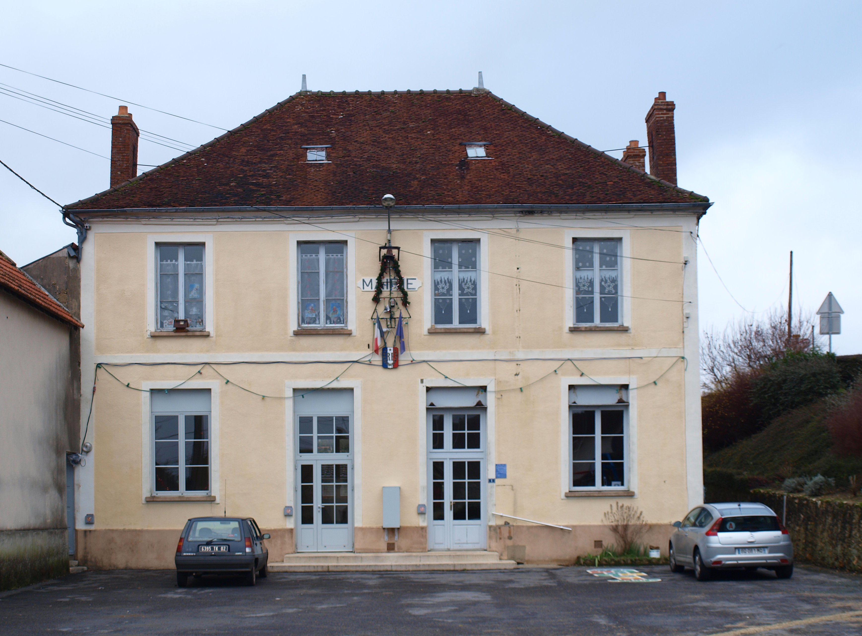 Viffort (Aisne, France) ; mairie